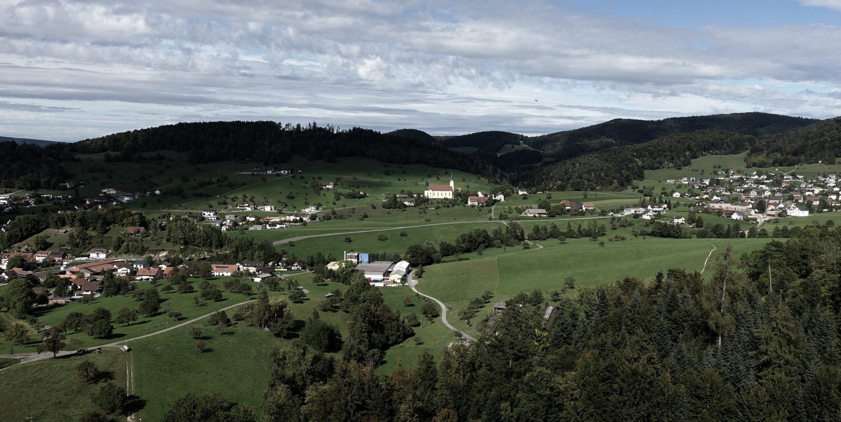 Blick von der Ruine Gilgenberg nach Zullwil, Pfarrkirche auf dem Weiler Oberkirch, Nunningen, Solothurner Faltenjuras, Schweiz